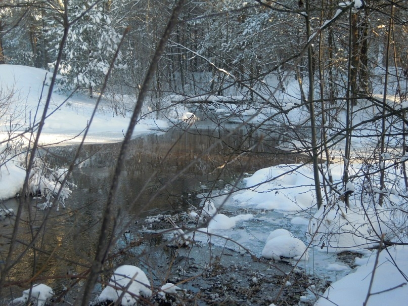 Нетронутые уголки природы